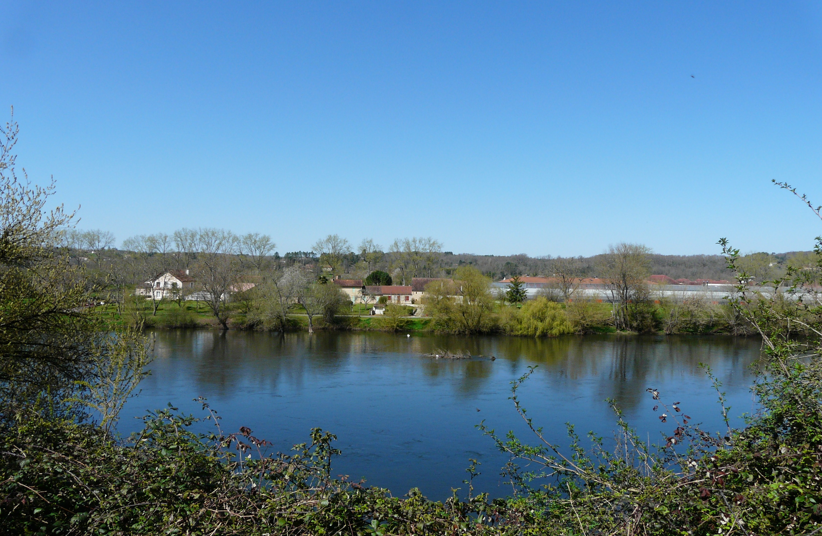 La Dordogne à Badefols-sur-Dordogne, Dordogne, France. Sur la rive en face, les communes de Lalinde (à gauche) et Mauzac-et-Grand-Castang (à droite).